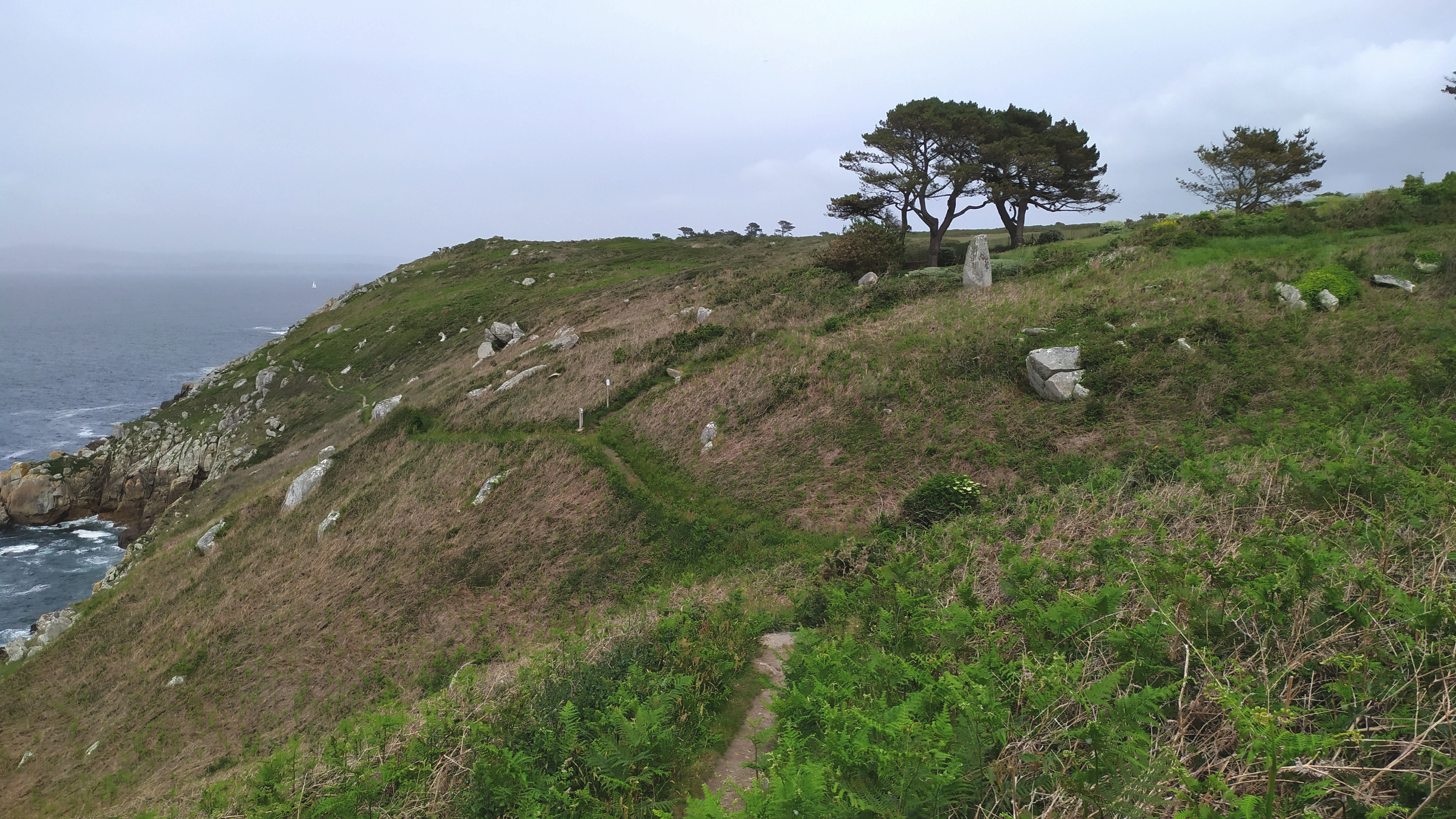 Littoral de Kergavan en Poullan-sur-Mer. Un des deux menhirs de Kergavan est visible sur les hauteurs, devant les arbres.